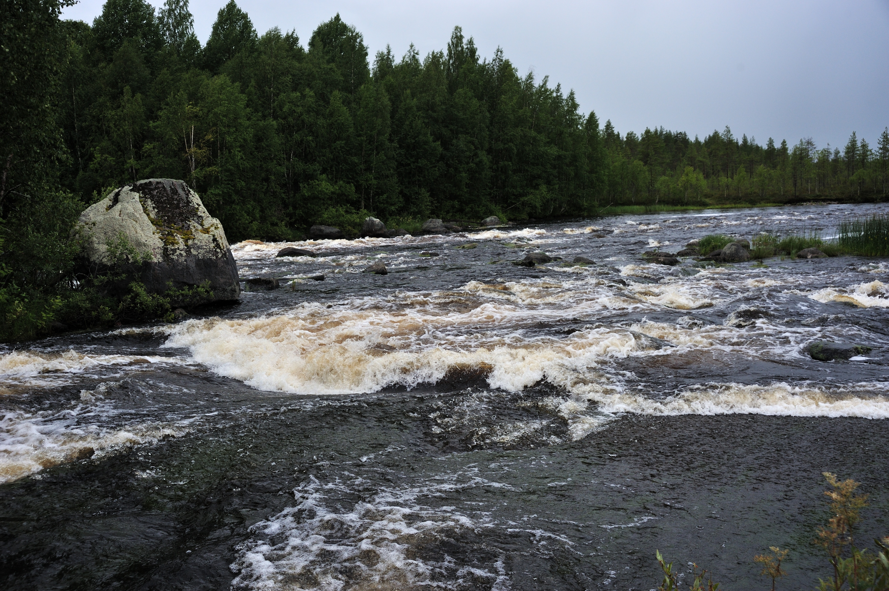 Щелье - самый сложный порог Онды. Вид с правой (мелкой) стороны, основная струя слева, за островом.